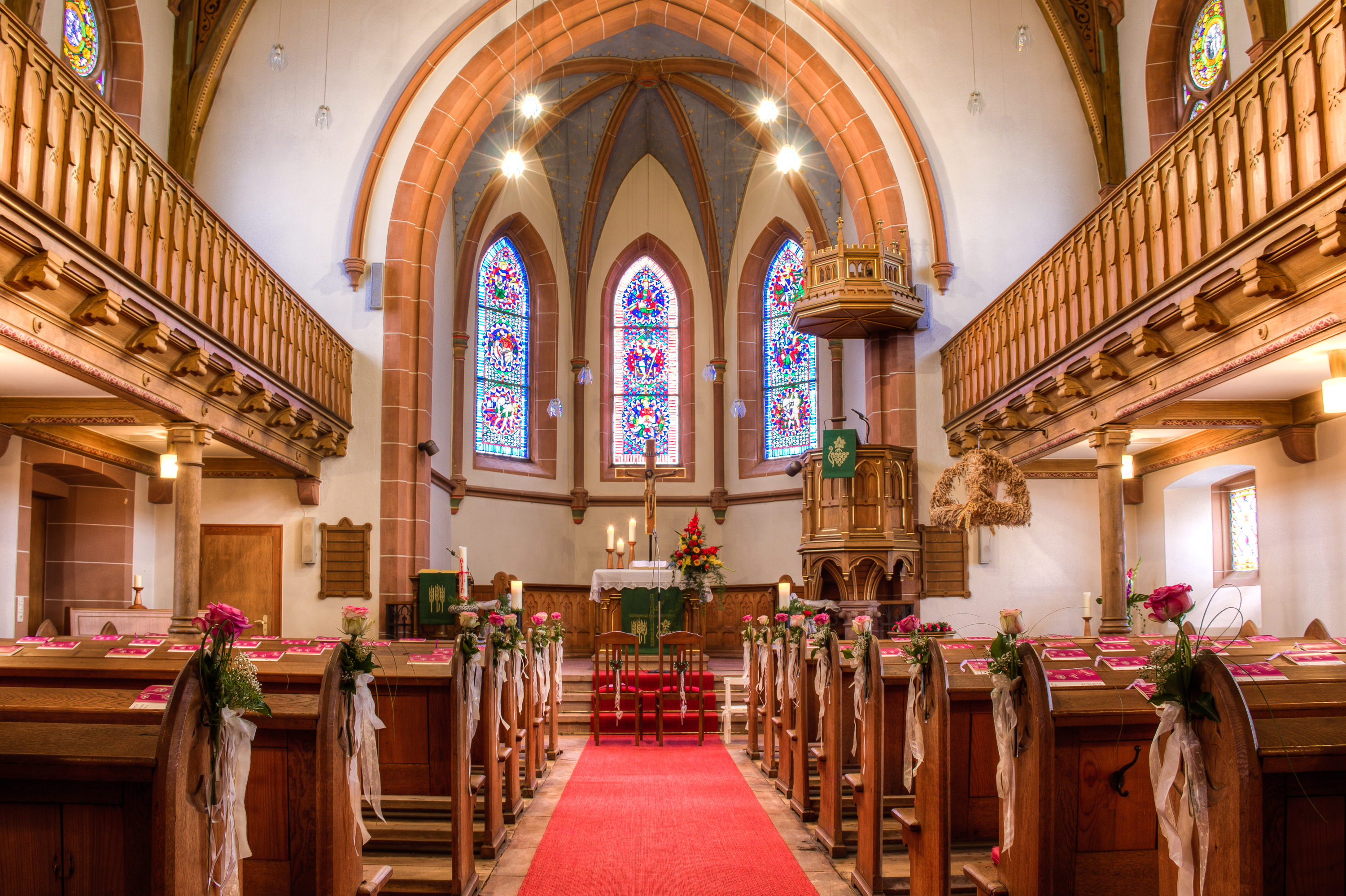 Evangelische Kirche Annerod, Gemeinde Fernwald, Landkreis Gießen in Hessen, Deutschland